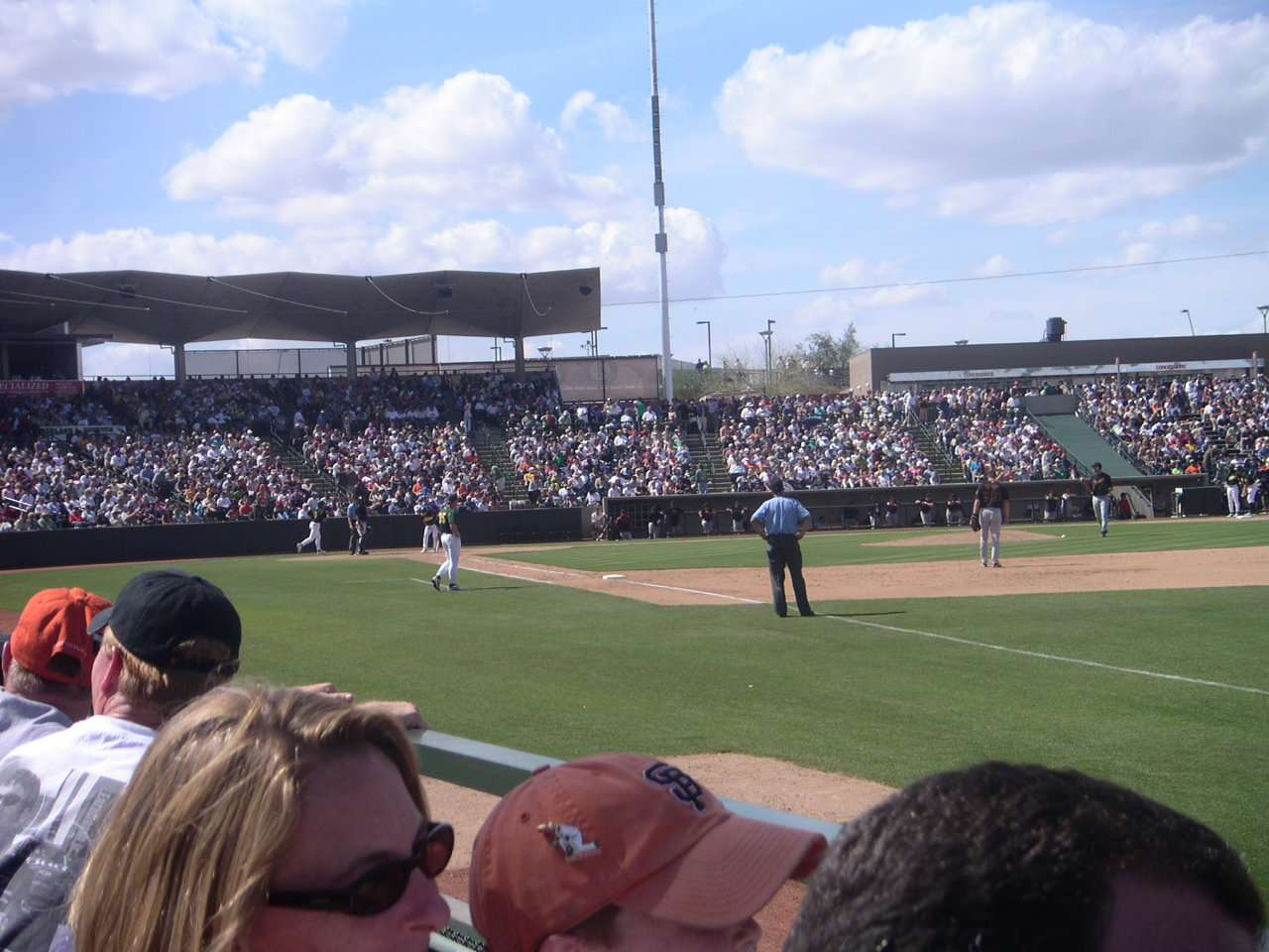 Phoenix Municipal Stadium, Phoenix, AZ -- March 2005